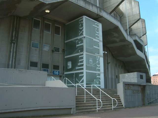 Ernest Lluch kultur etxea, Anoetako estadioan.